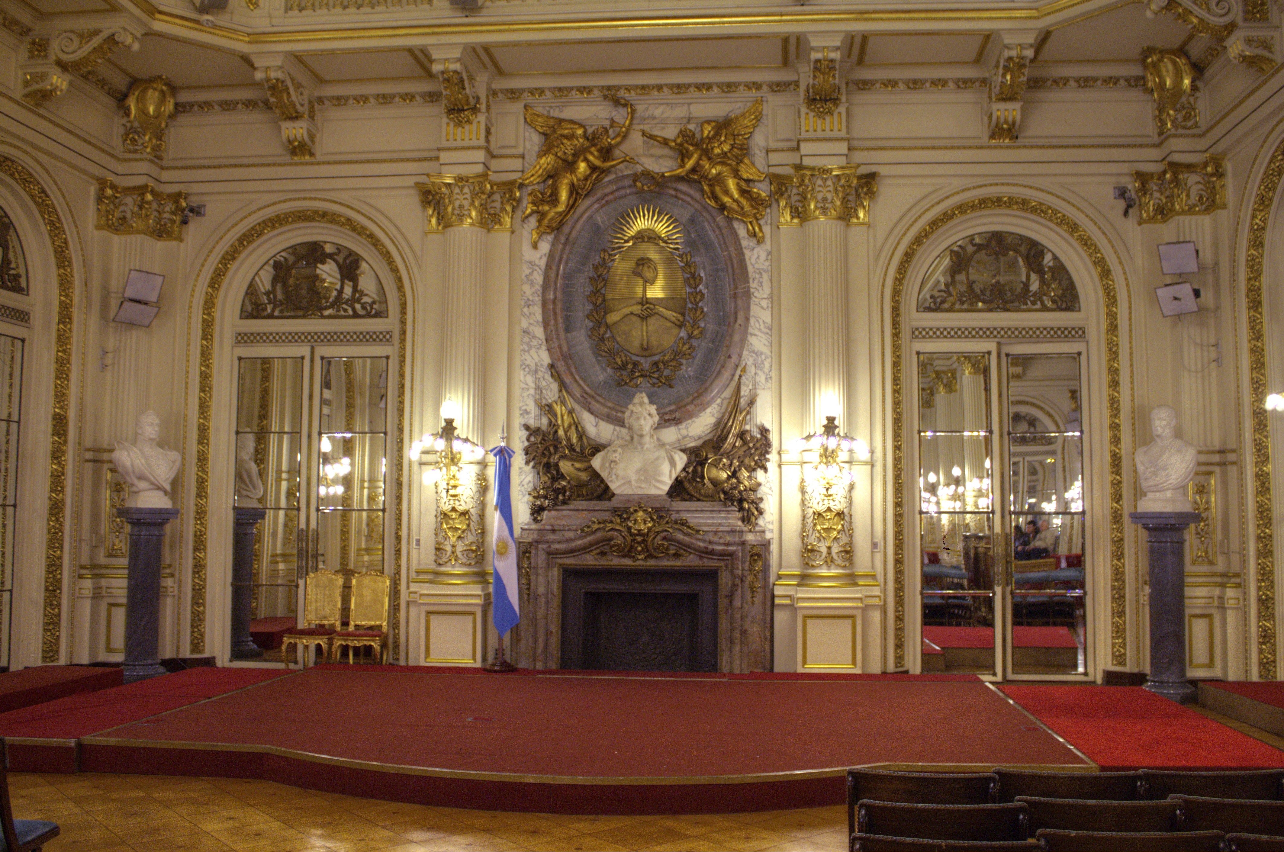 El salón blanco ubicado en casa rosada, casa de gobierno de la República Argentina se destaca la escultura "La república de Ettore" Ximenes y el escudo nacional.